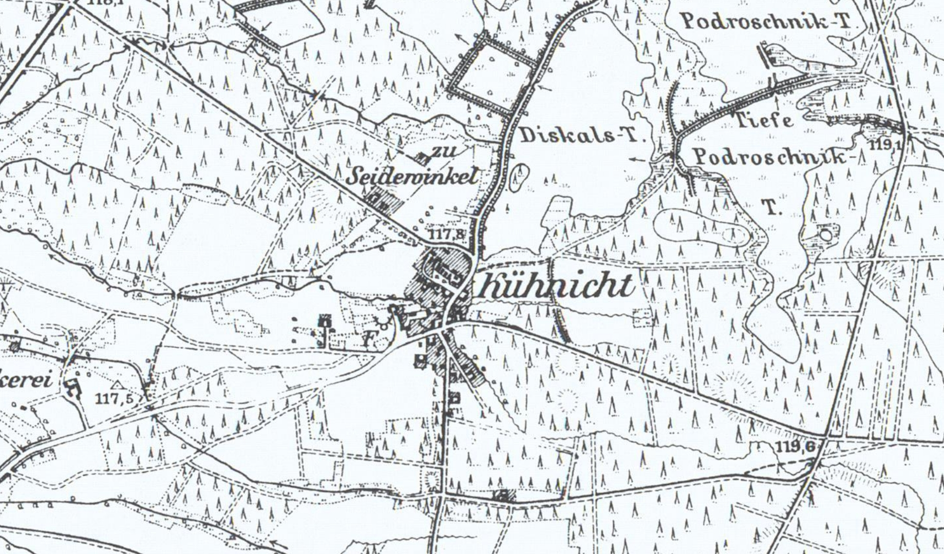 Der Ort Kühnicht bei Hoyerswerda auf dem Messtischblatt von 1901. Hornjoserbsce: Kinajcht pola Wojerec na hamtskej karće z lěta 1901.